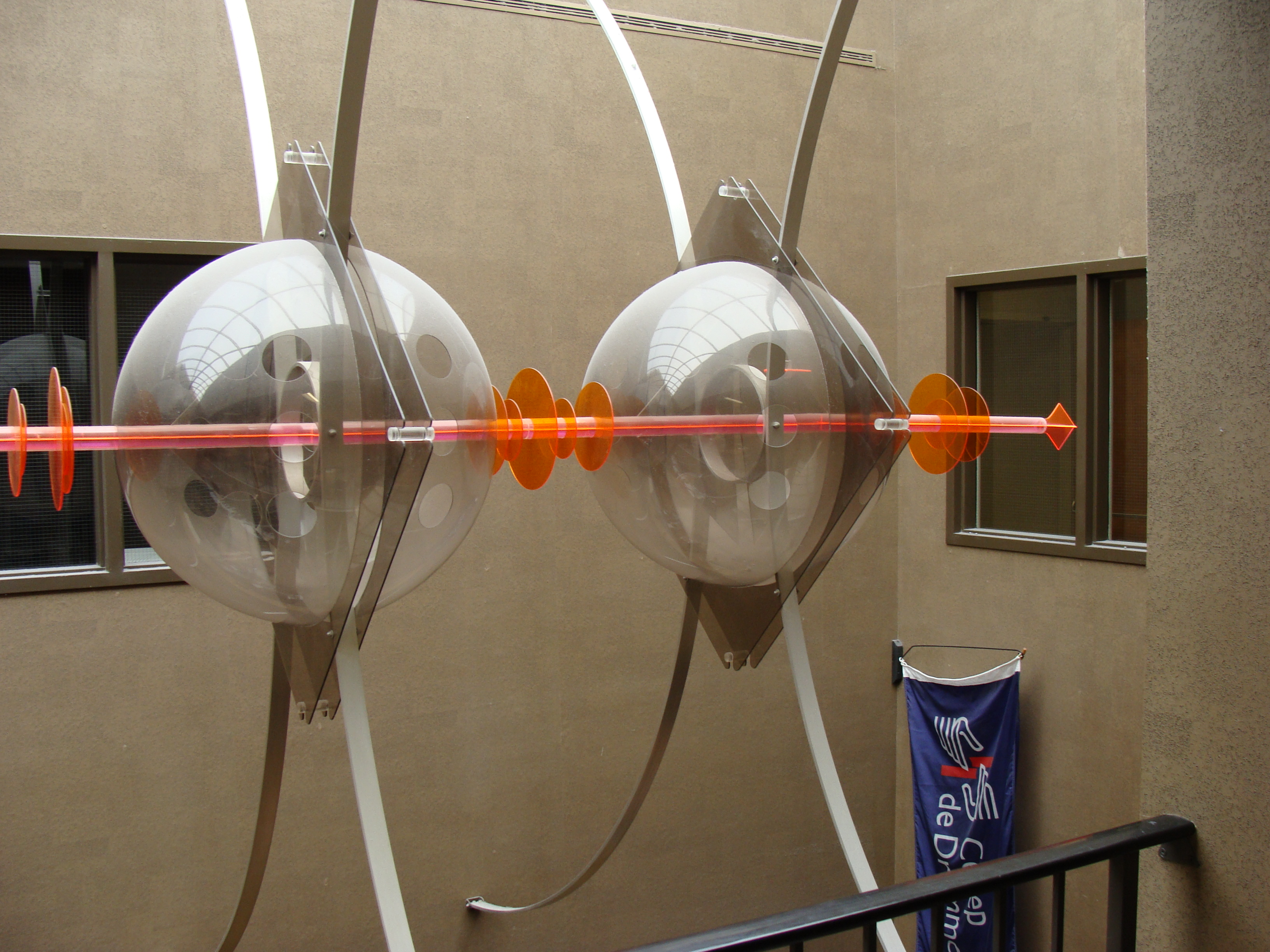 Cégep de Drummondville.